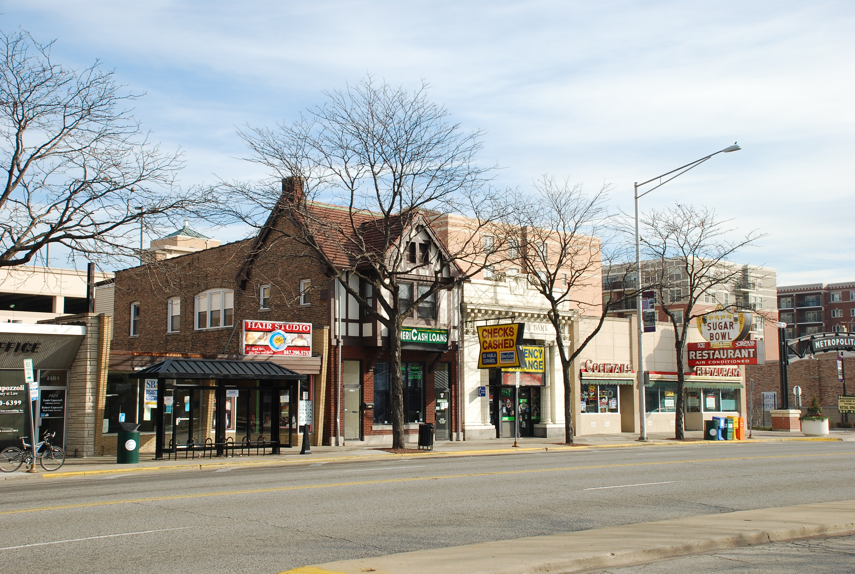 Des Plaines, Illinois.